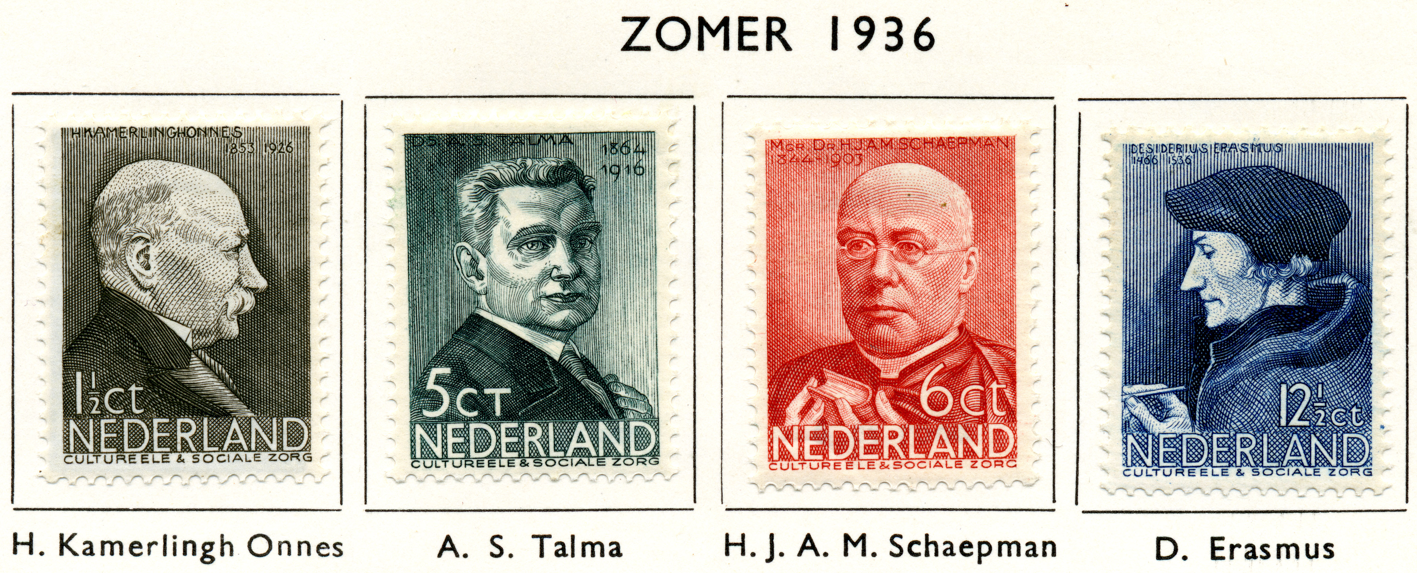 Zomerzegels (1936) met H. Kamerlingh Onnes, A.S. Talma, H.J.A.M. Schaepman en D. Erasmus. NVPH nr 283-286. Ontwerp door Hendrik Seegers. Ontwerp en gravure door S.L. Hartz (1½ en 12½ ct) en E. Reitsma-Valença (5 ct).